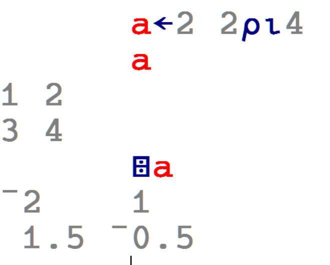 Fonction domino (inversion de matrice) en APL